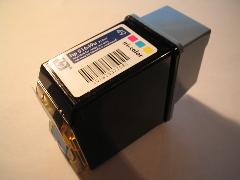 Inktcartridge ter waarde van 35 euro